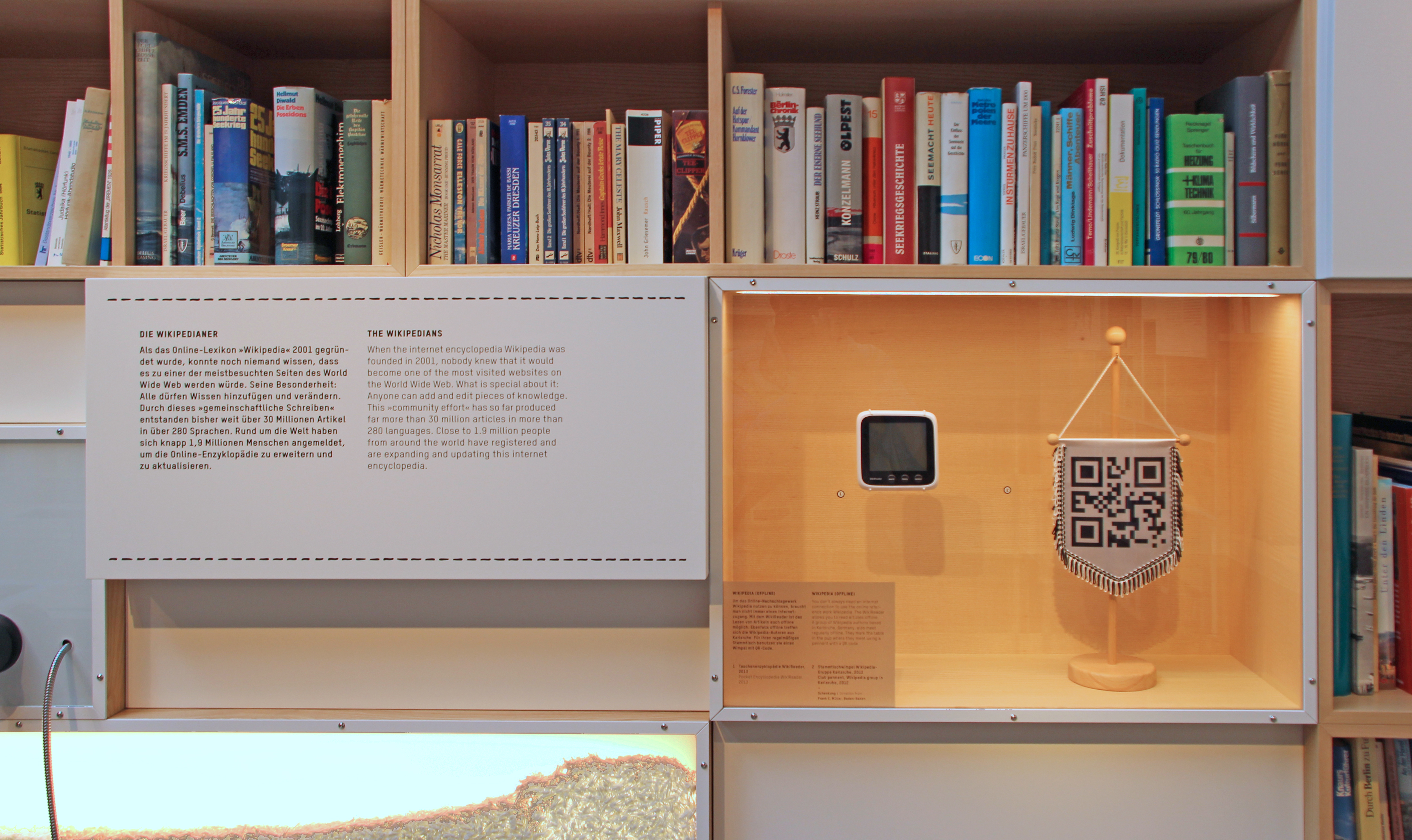 Bildinhalt: Bücher, ein Erläuterungstext zur Wikipedia, ein Wikipedia-Reader und der Wimpel des Karlsruher Wikipedia-Stammtisches, in der Sonderausstellung "Das Netz - Menschen, Kabel, Datenströme" des Deutschen Technikmuseums Berlin Aufnahmeort: Berlin, Deutschland